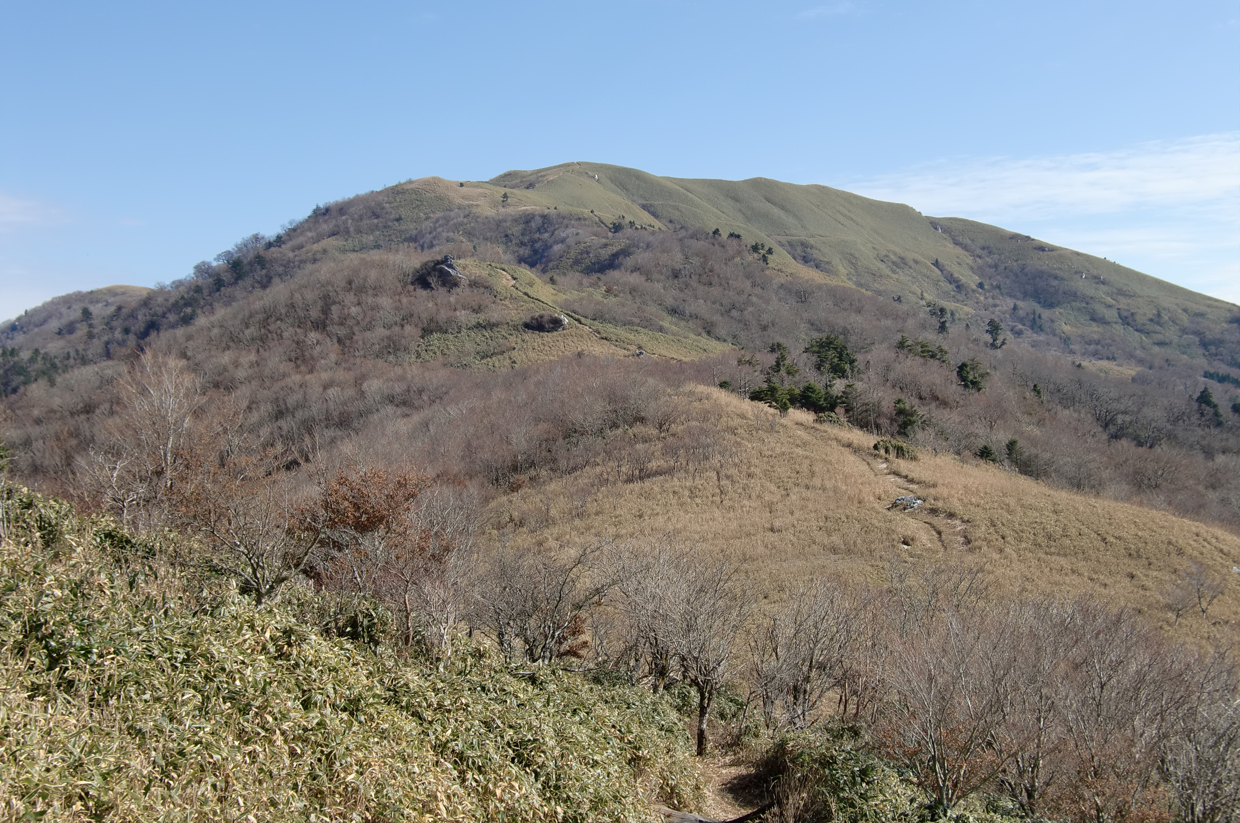 山頂へ向かう登山道より